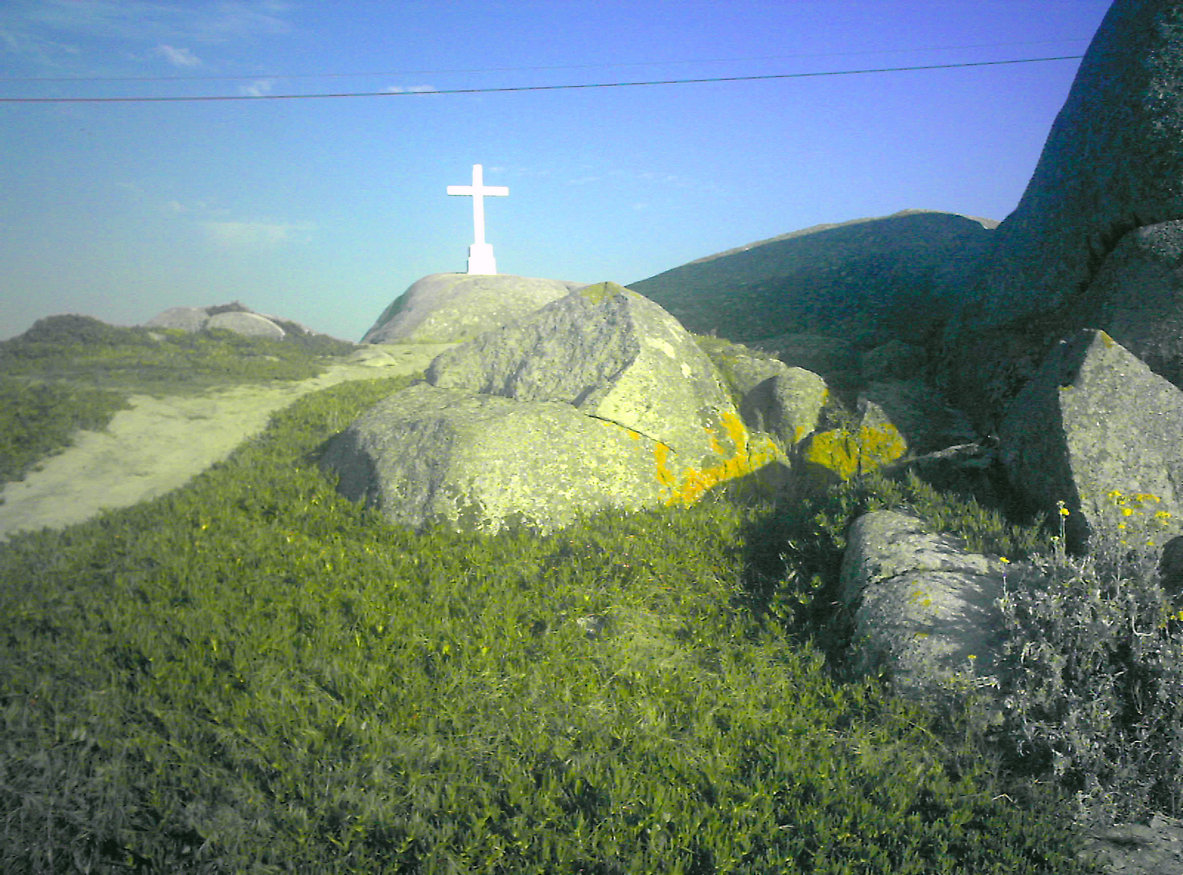 Penedo do Santo visto de Norte